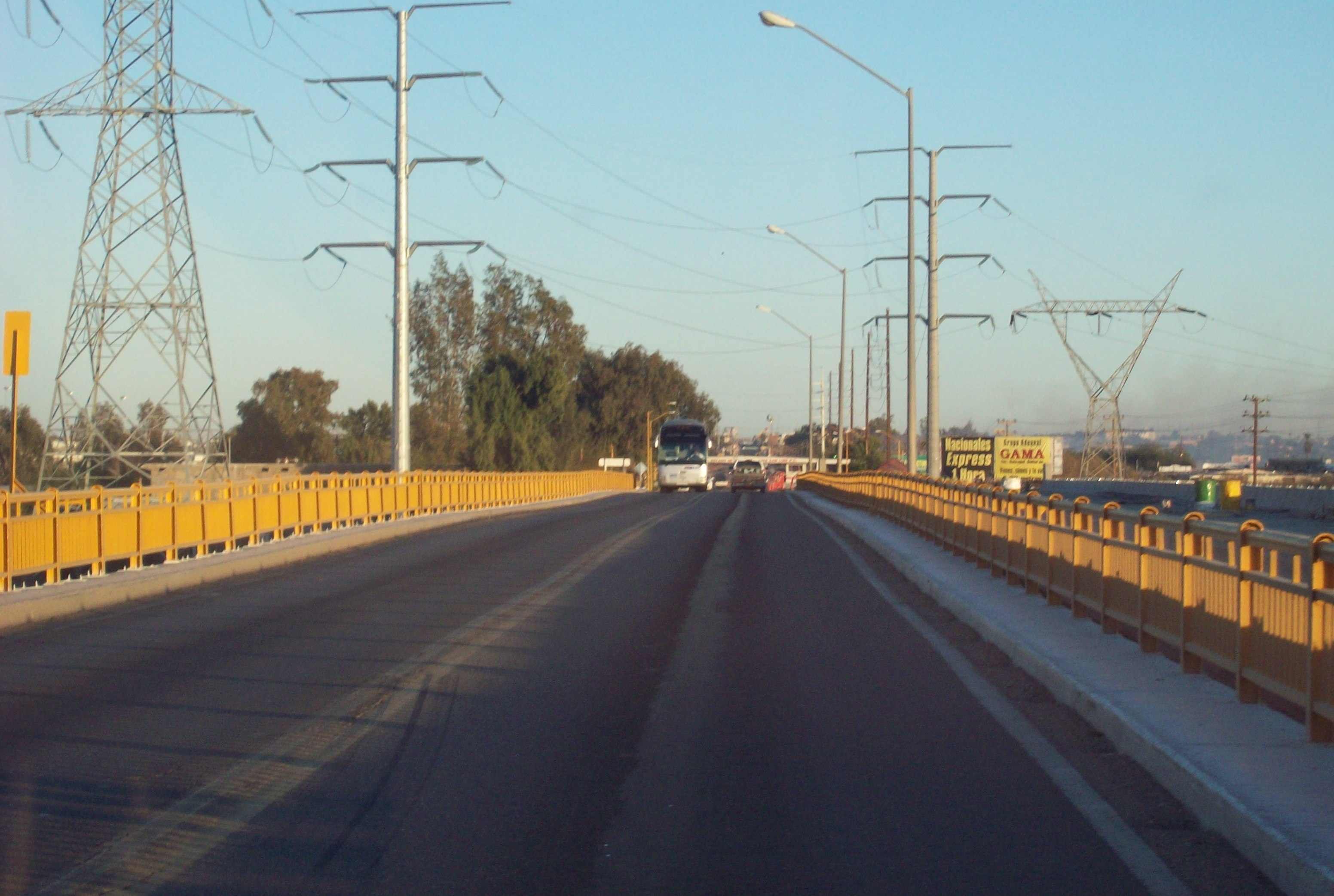 puente rio colorado